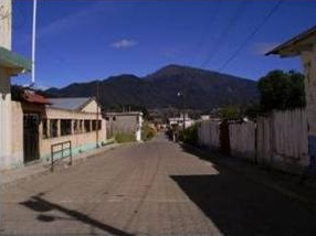 Vista de Esquipulas Palo Gordo, Cabecera municipal del Municipio con el mismo nombre, en la Departamento de San Marcos en Guatemala